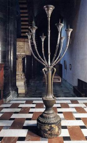 Maso di bartolomeo (1440) candelabro, cathedral of prato